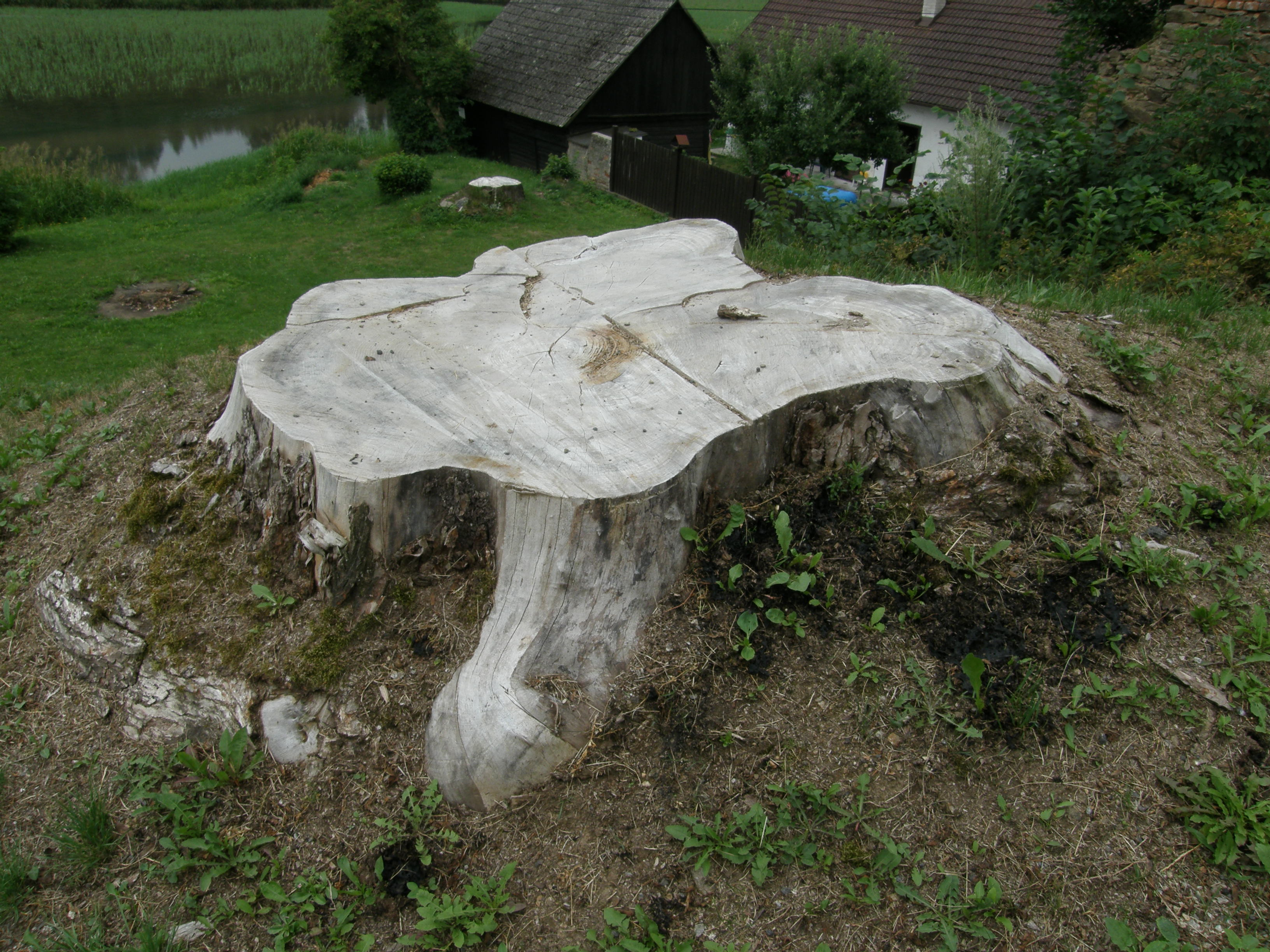 Pokácené památné stromy - jilmy horské v Budči v okrese Jindřichův Hradec, Česká republika.